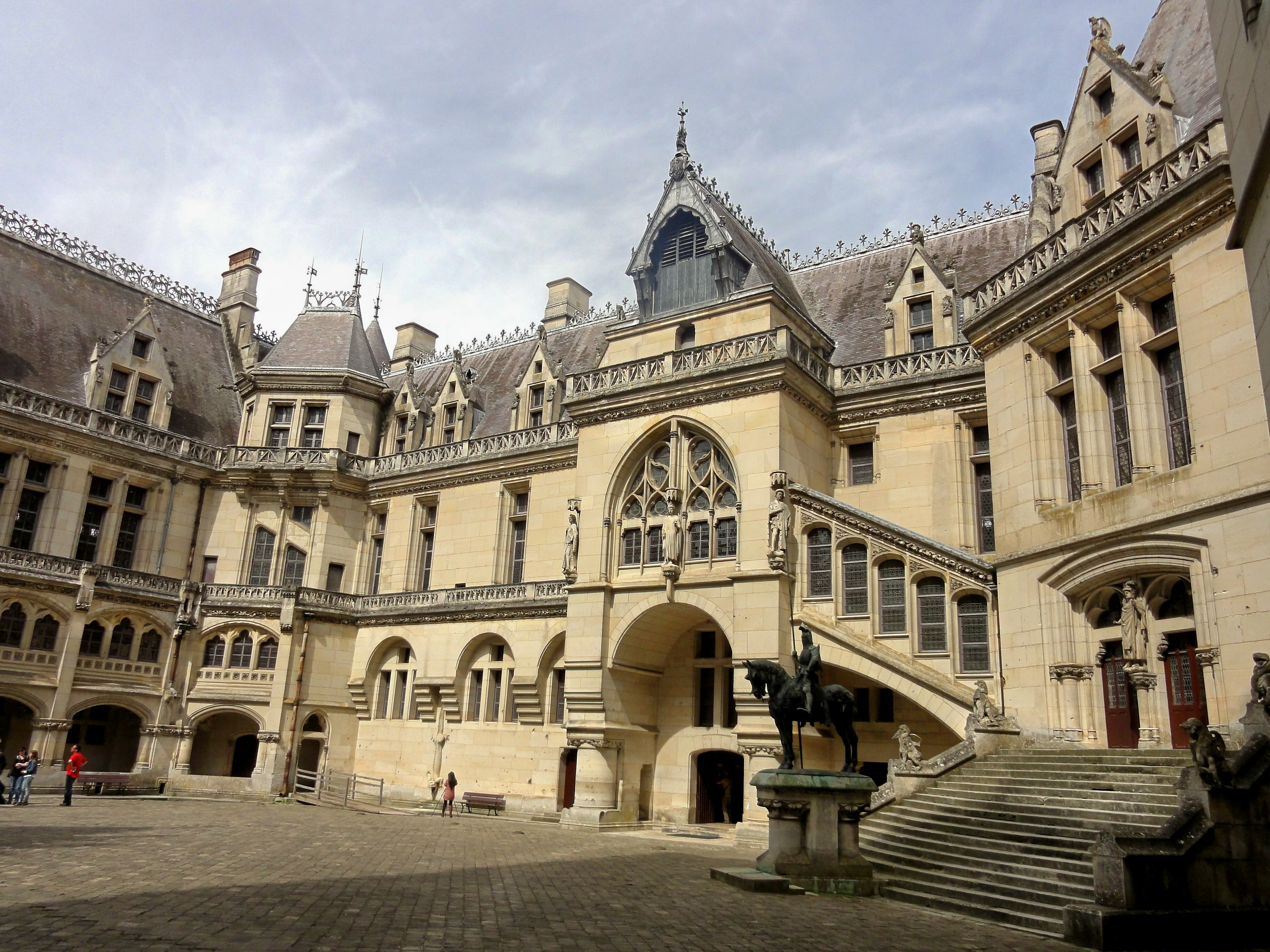 Côté nord.